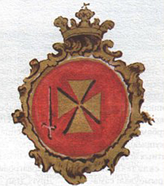 Беларуская (тарашкевіца): Крычаў (Kryčaŭ). Герб места